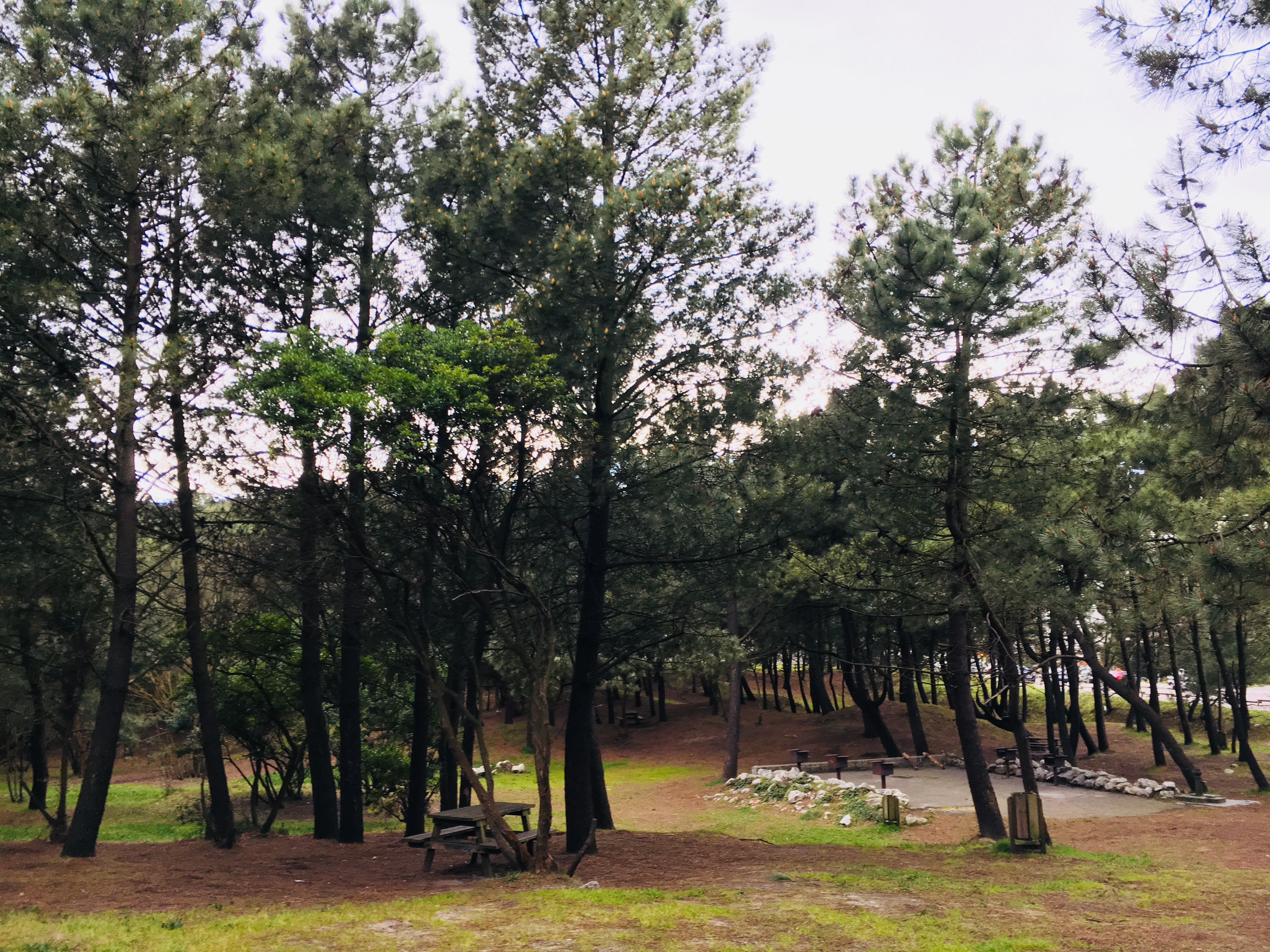 Zona merendero del pinar